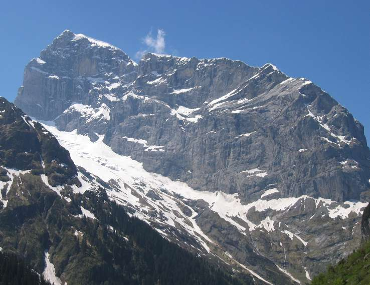 Titlis-Ostwand